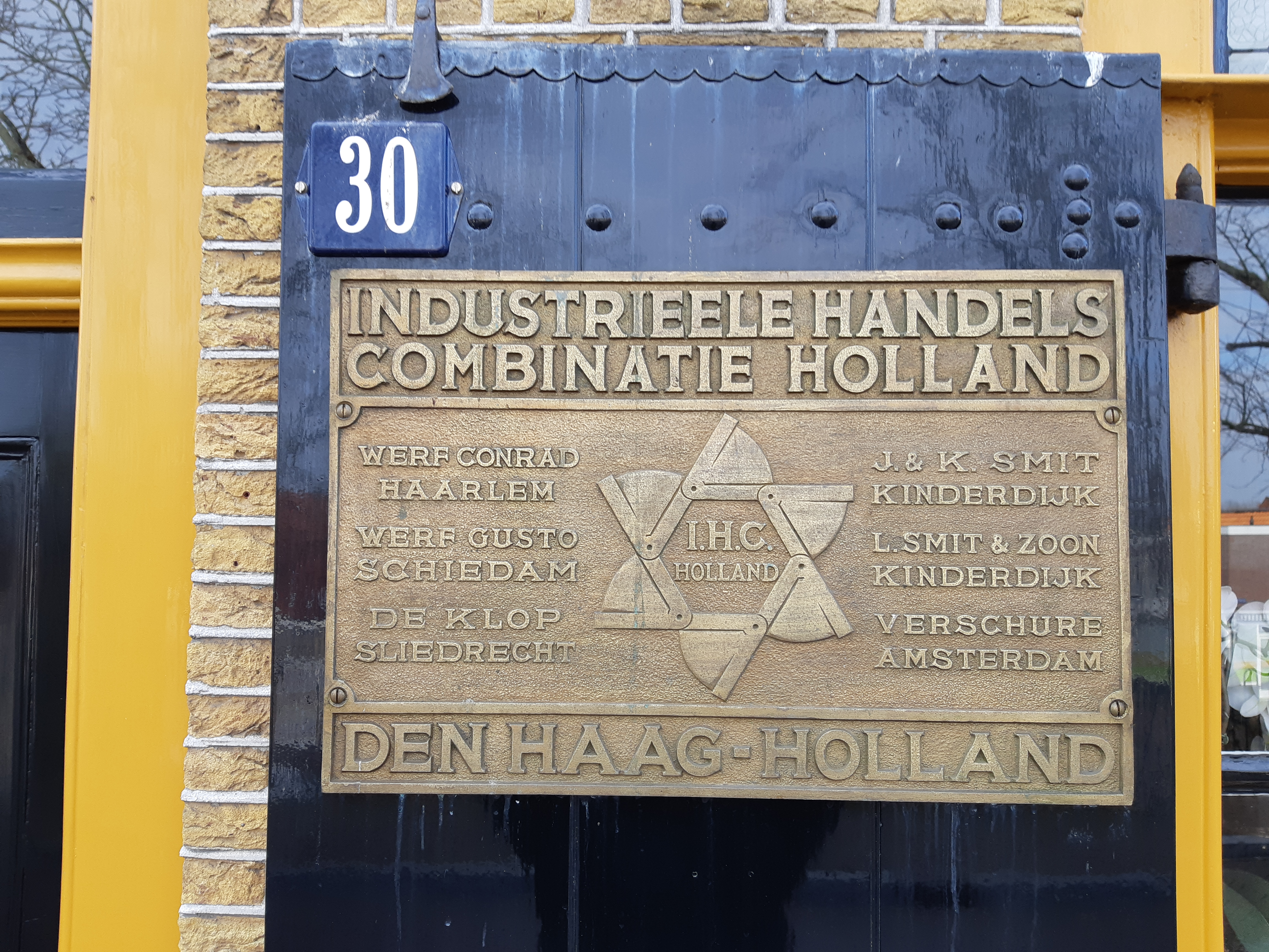 Werfplaat van de Industriële Handel Combinatie Holland aangebracht op de binnenzijde van een vensterluik aan een woning op de Zuiddijk in Maassluis.